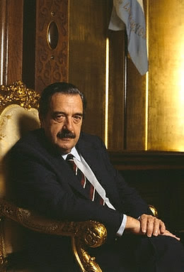 Presidente argentino Raúl Alfonsín en 1984.